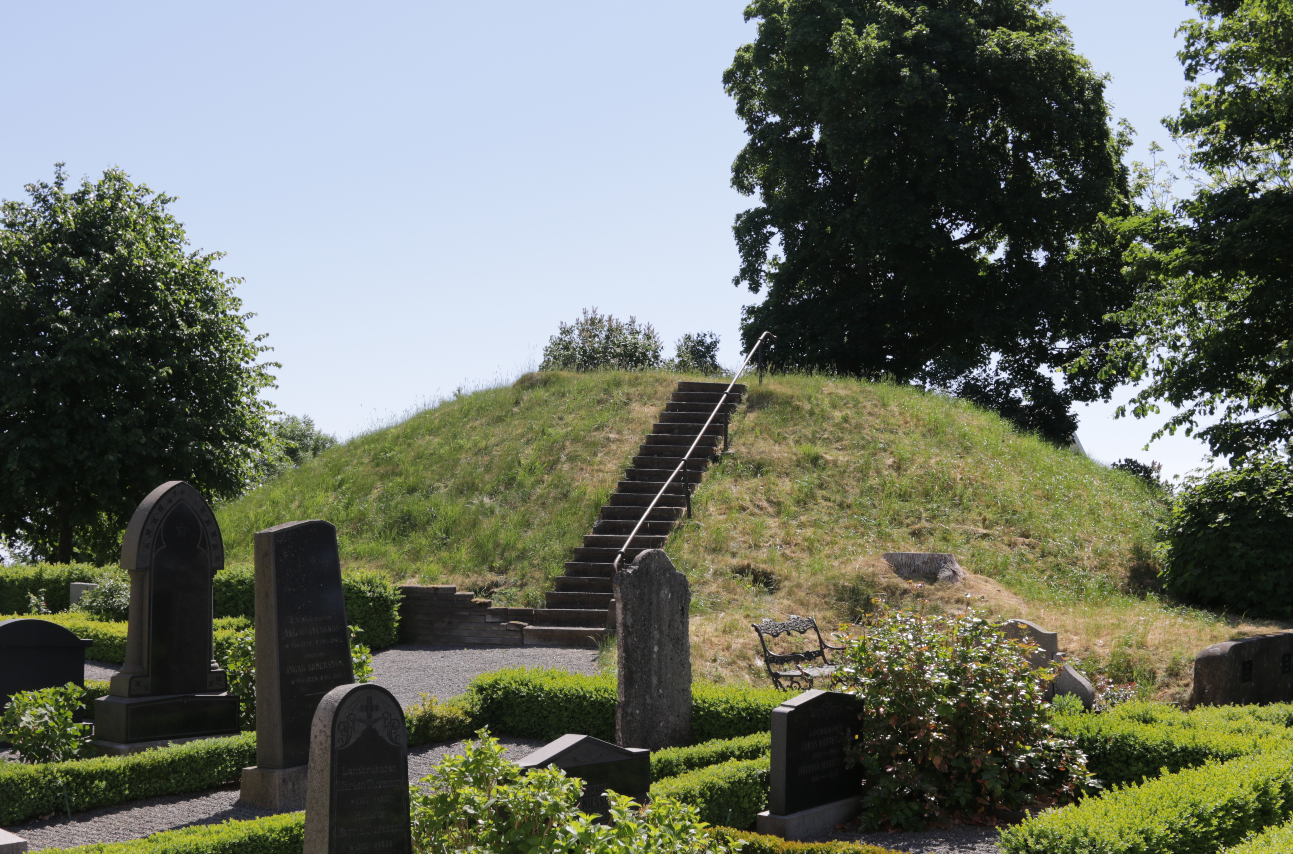 Snåres hög, Snårestad 1-1, Hög